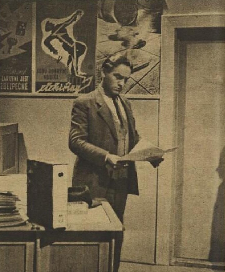 Rudolf Deyl ml. (1912-1967), český herec